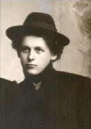 Josef Palivec (1886 - 1975), Český básník, esejista, překladatel a diplomat.